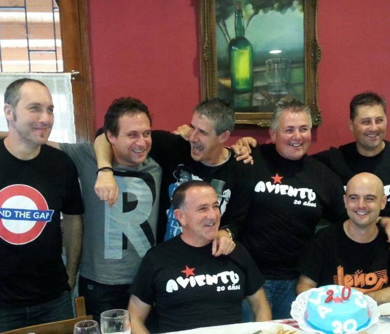 Avientu en la comida del 20 aniversario.